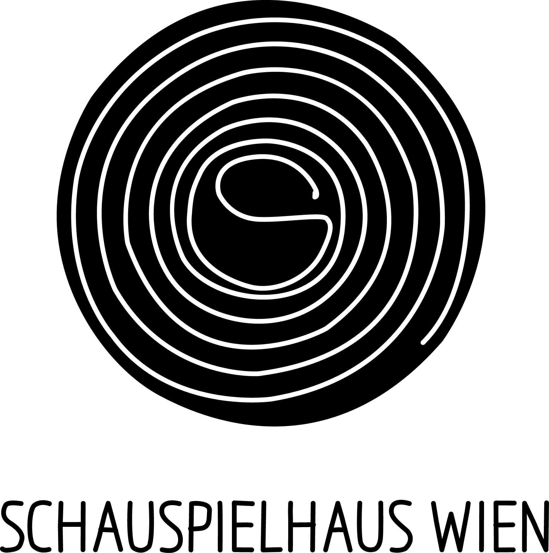 Neues Logo (2015)